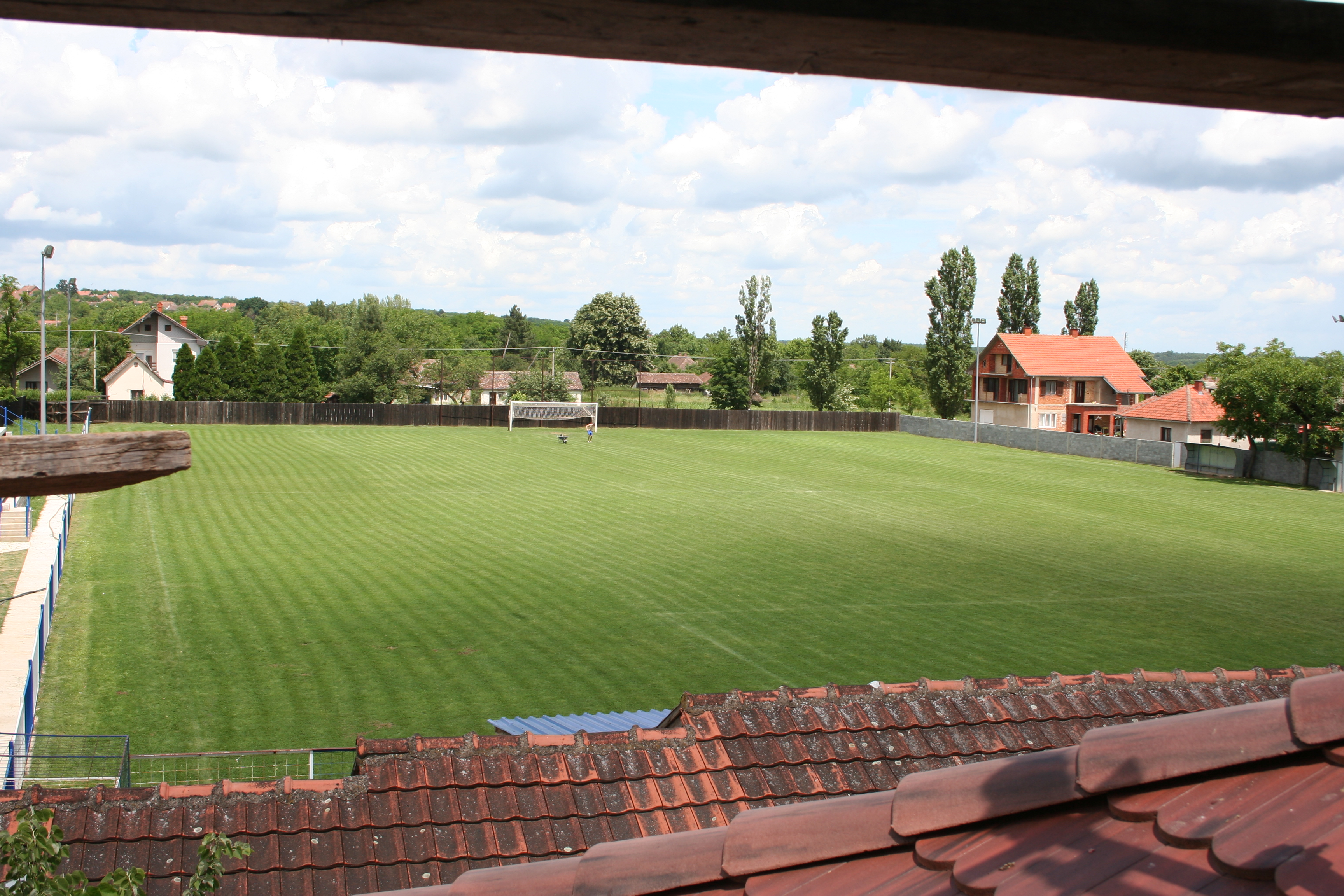 Pogled na seosko igralište sa crkvenog tornja